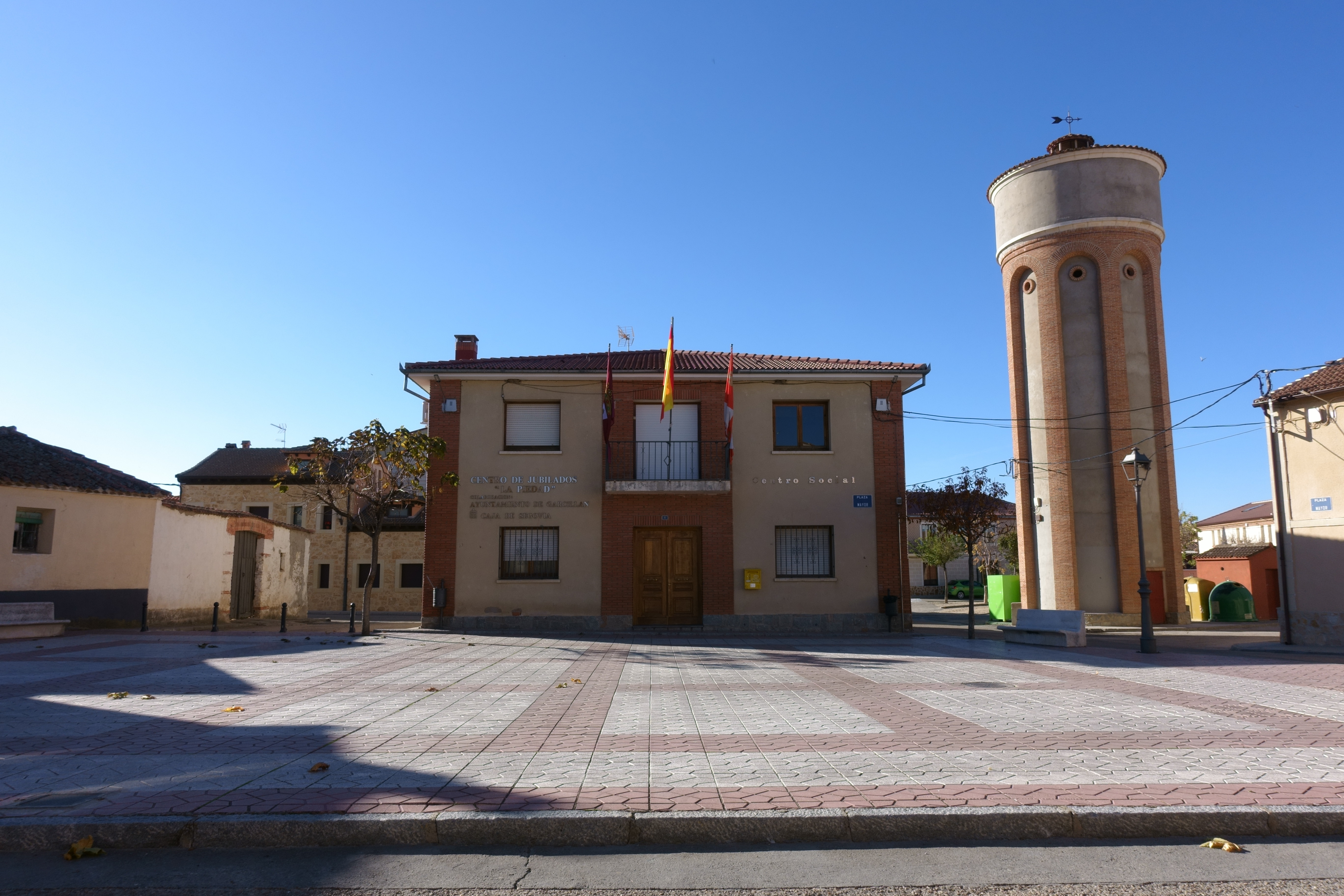 Casa consistorial de Garcillán (Segovia, España).